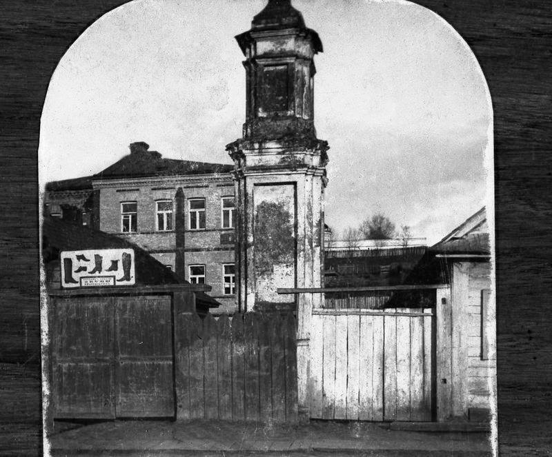 Беларуская (тарашкевіца): Менск (Miensk), Няміга (Niamiha) і шлях Каралеўскі (šlach Karaleŭski). Юбілейны помнік